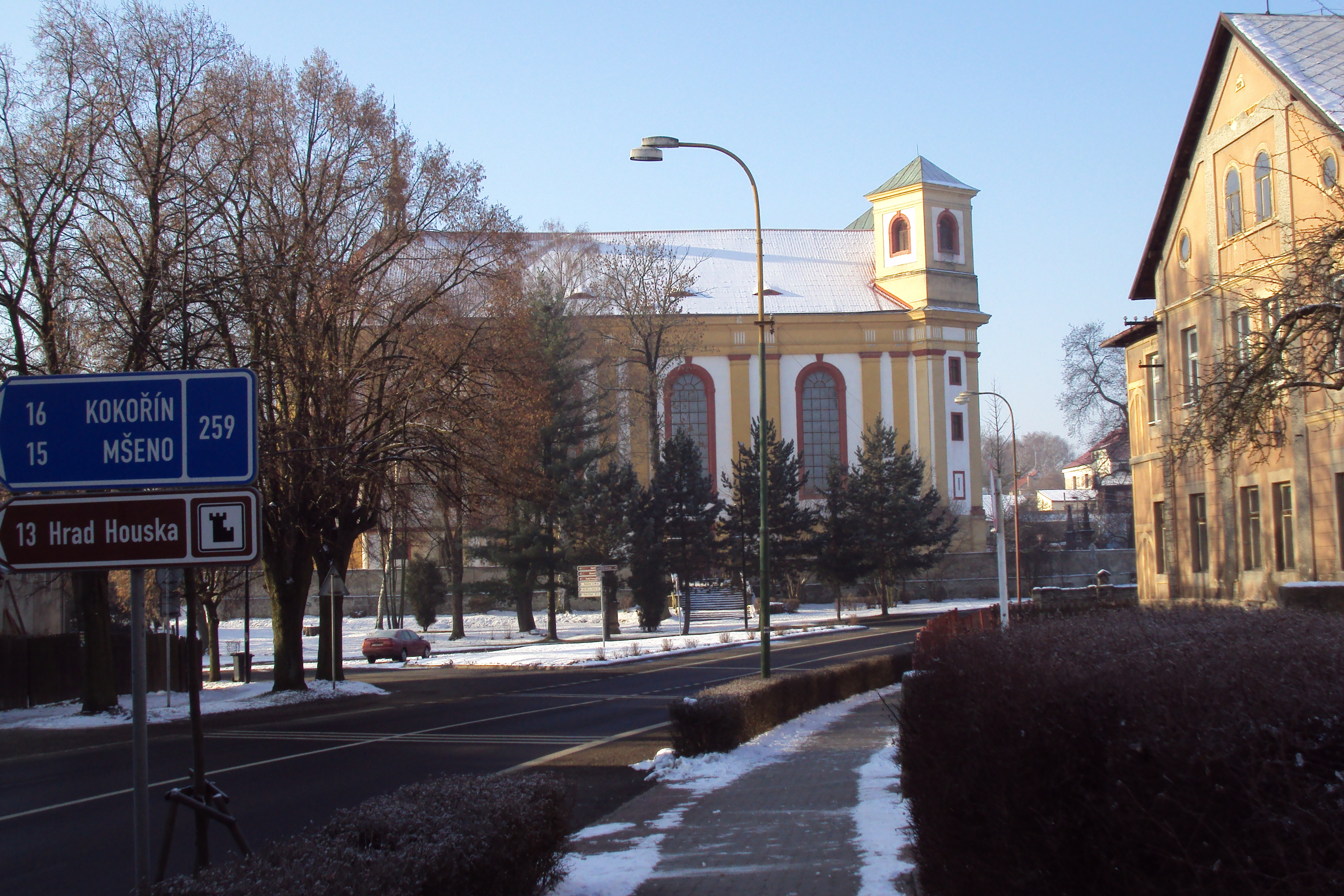 Kostel Nalezení sv.Kříže v Dubé